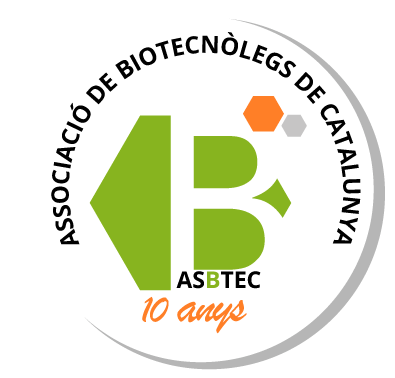 Logo de l'Associació de Biotecnòlegs de Catalunya durant el seu desè aniversari - Any 2015